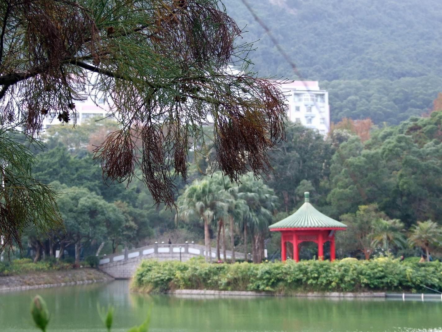 中文大學獅子亭